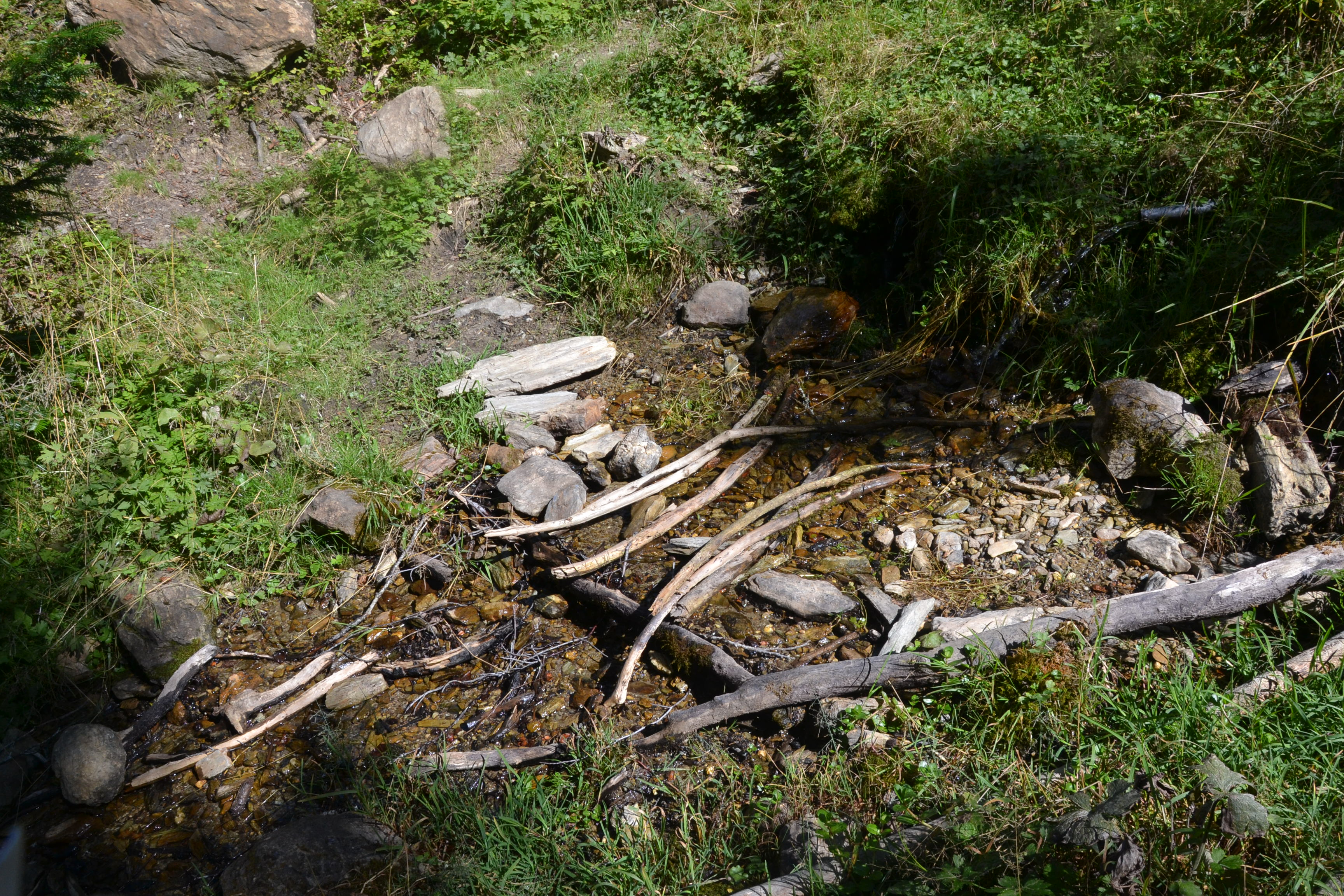 L'Hers-Vif à sa source (Prades, Ariège, France).